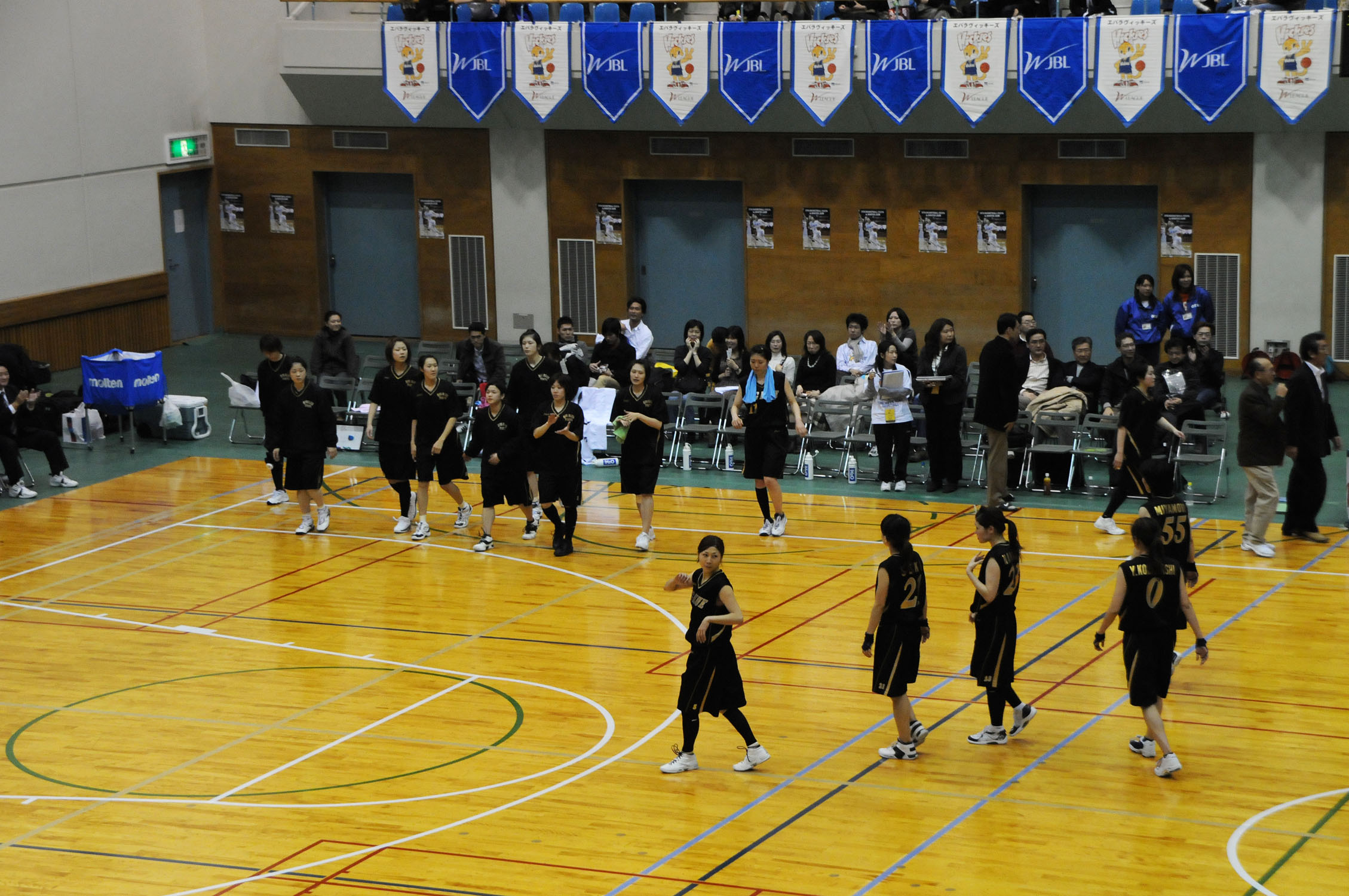 ビッグブルー東京。大田区立大森スポーツセンターで。